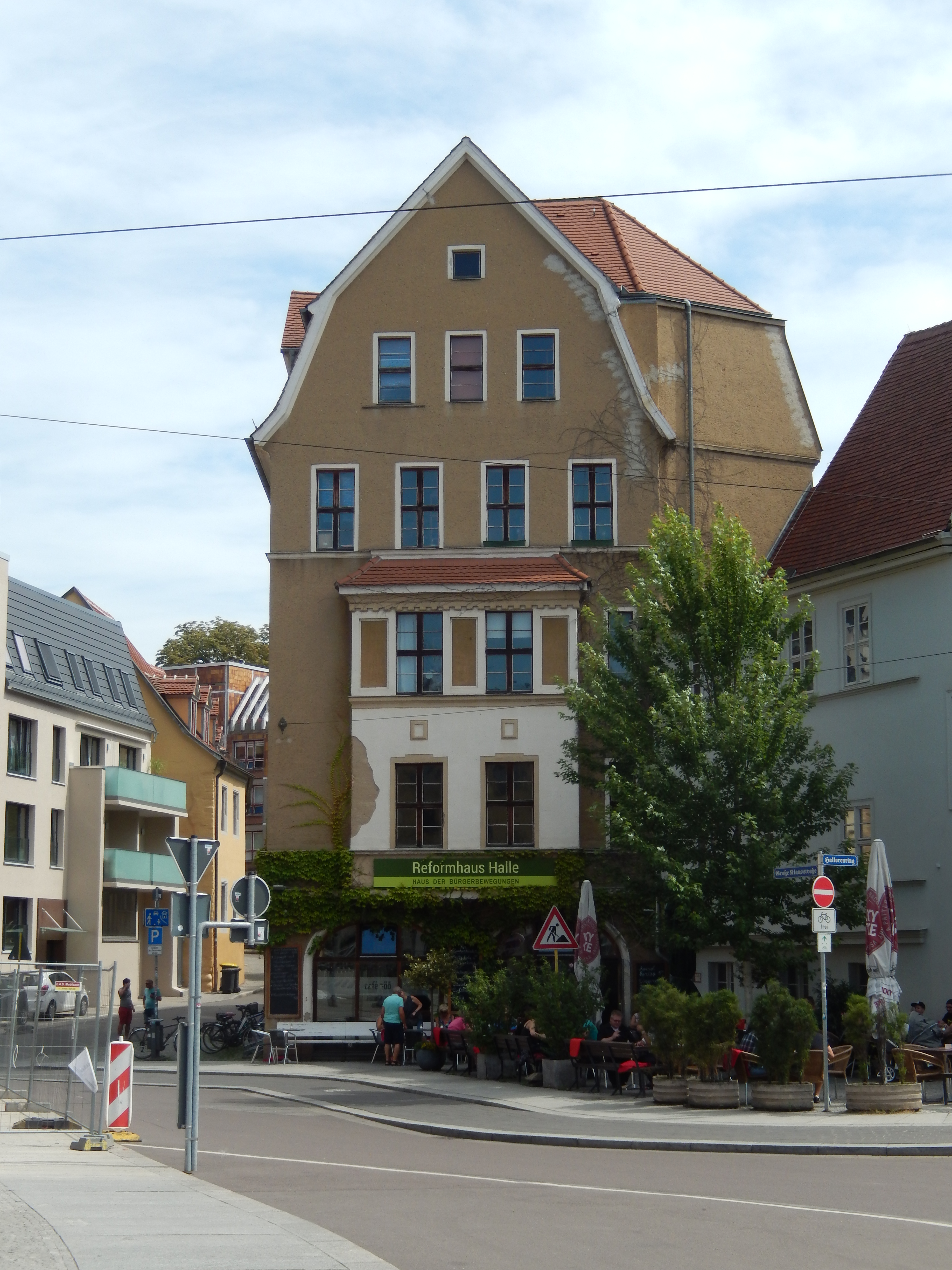 Reformhaus Halle, Große Klausstraße 11